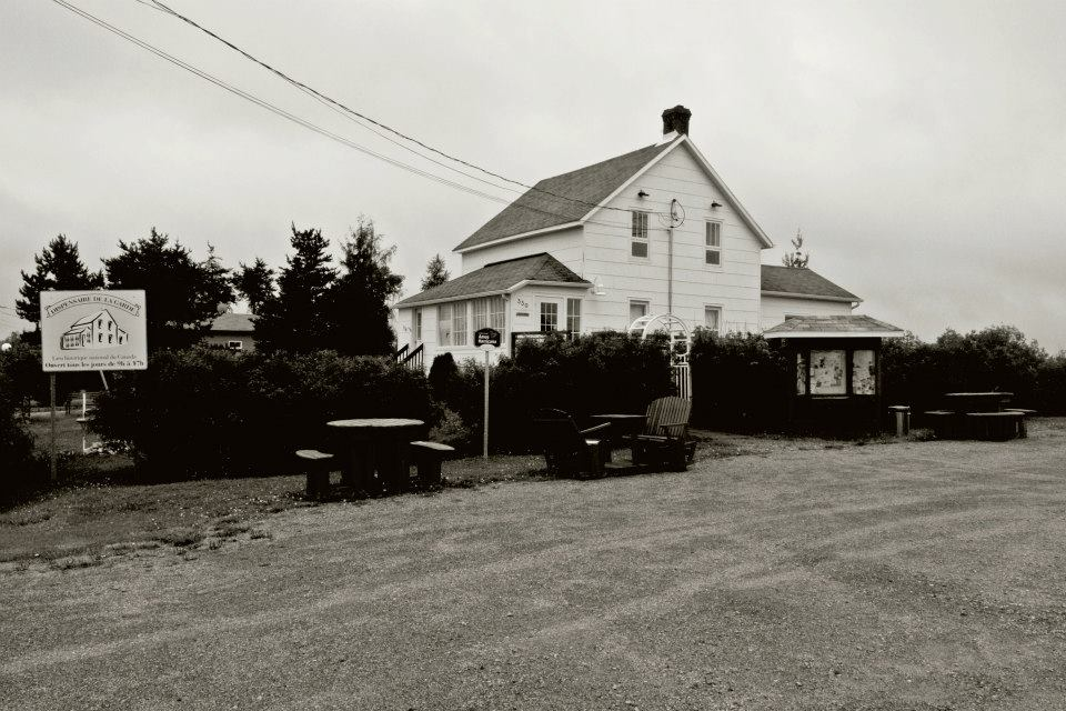 Dispensaire de la garde, 339, route 111, La Corne (Canada). (Protection IP cité. Voir la liste des lieux patrimoniaux de l'Abitibi-Témiscamingue pour plus de détails).